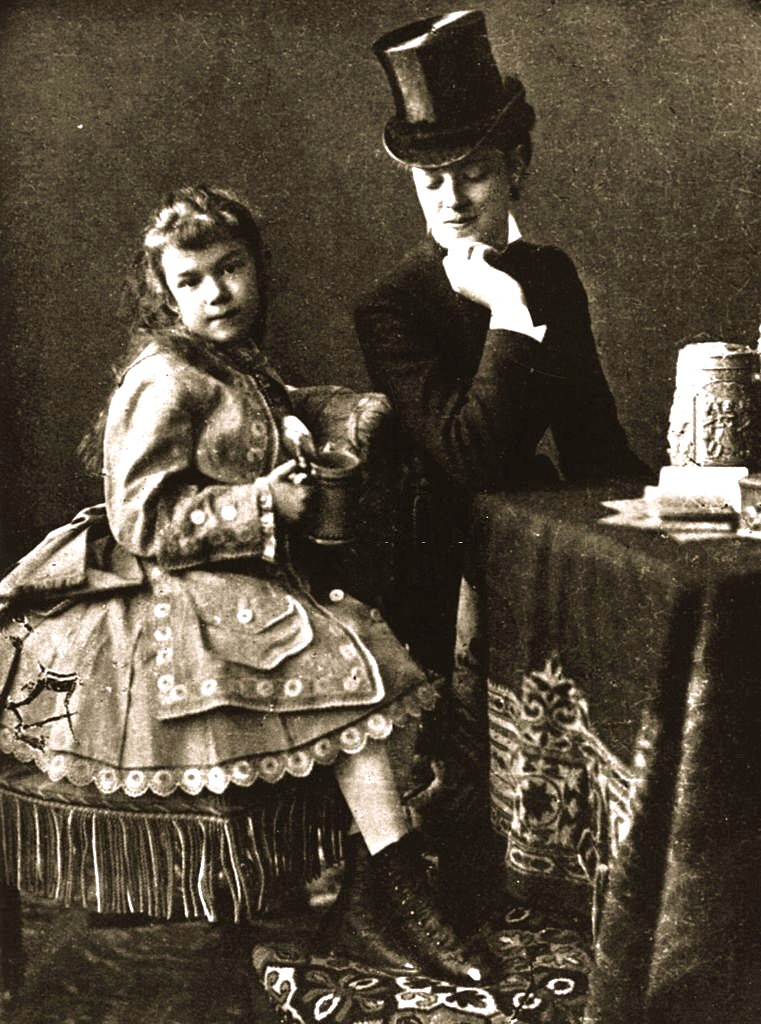 Countess Marie Larisch von Wallersee-Moennich and Archiduchesse Habsburg Maria Valeria of Austria